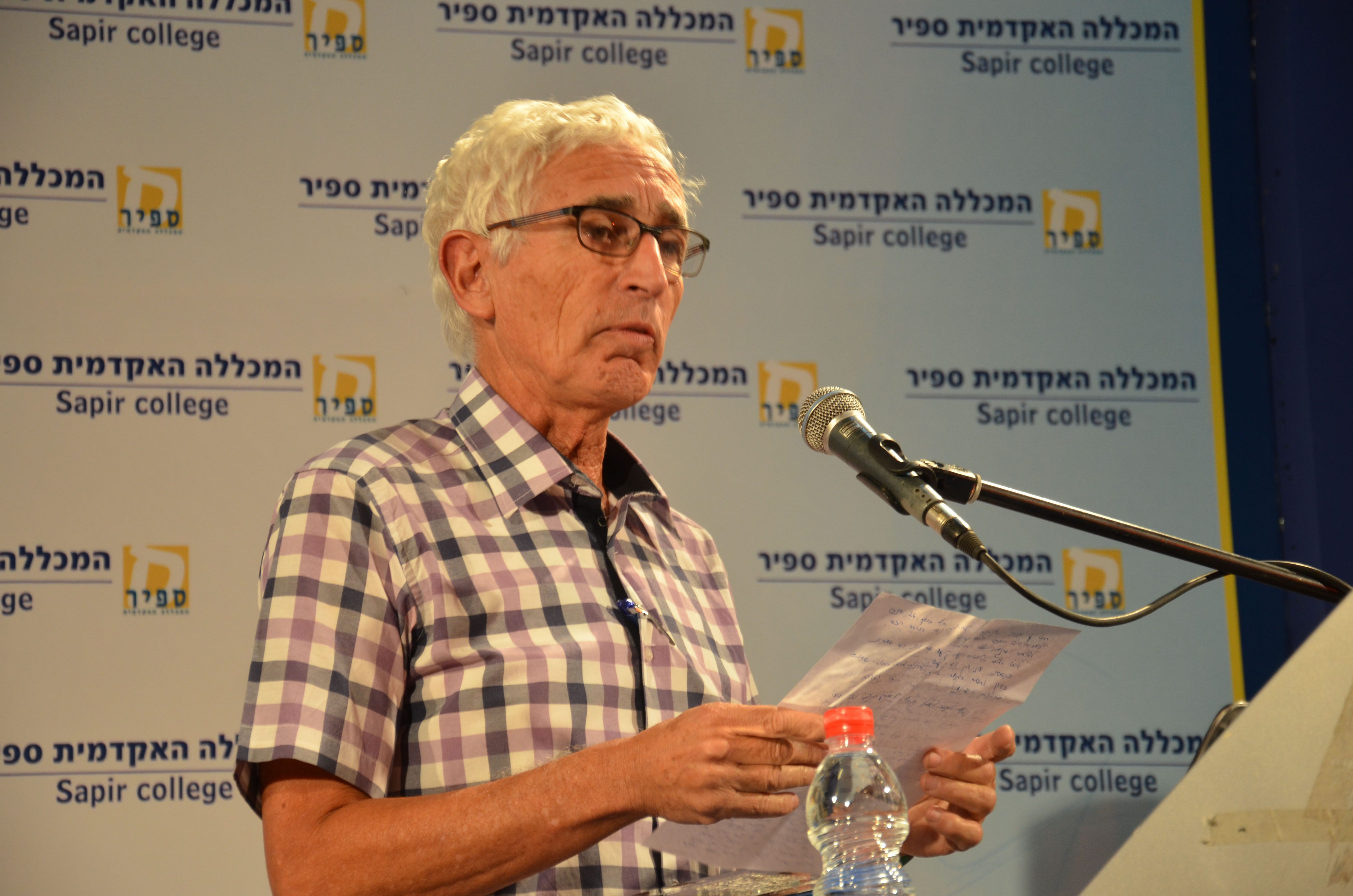 כנס שדרות לחברה במכללה האקדמית ספיר ובעיר שדרות 2015